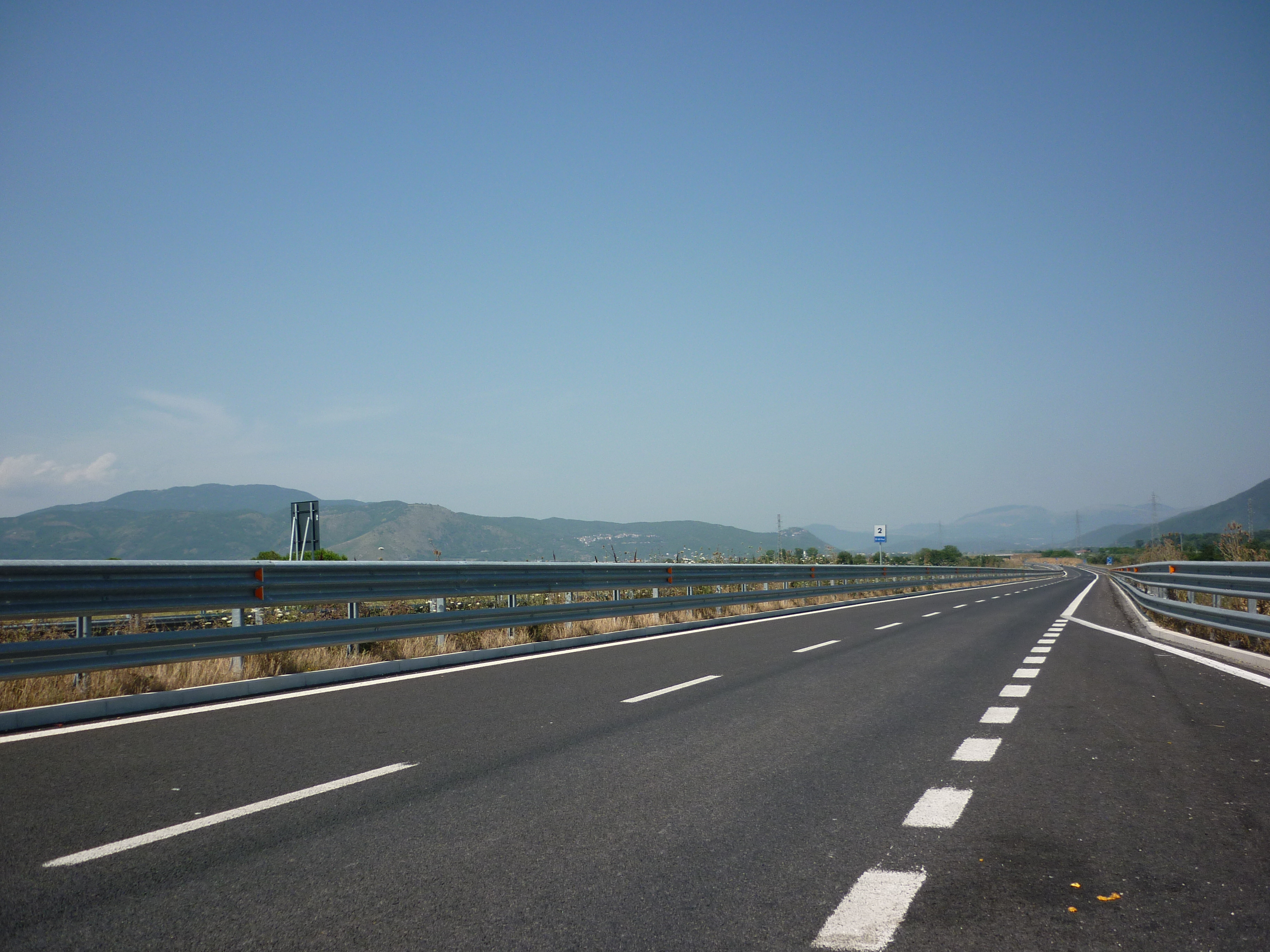 ss85VAR